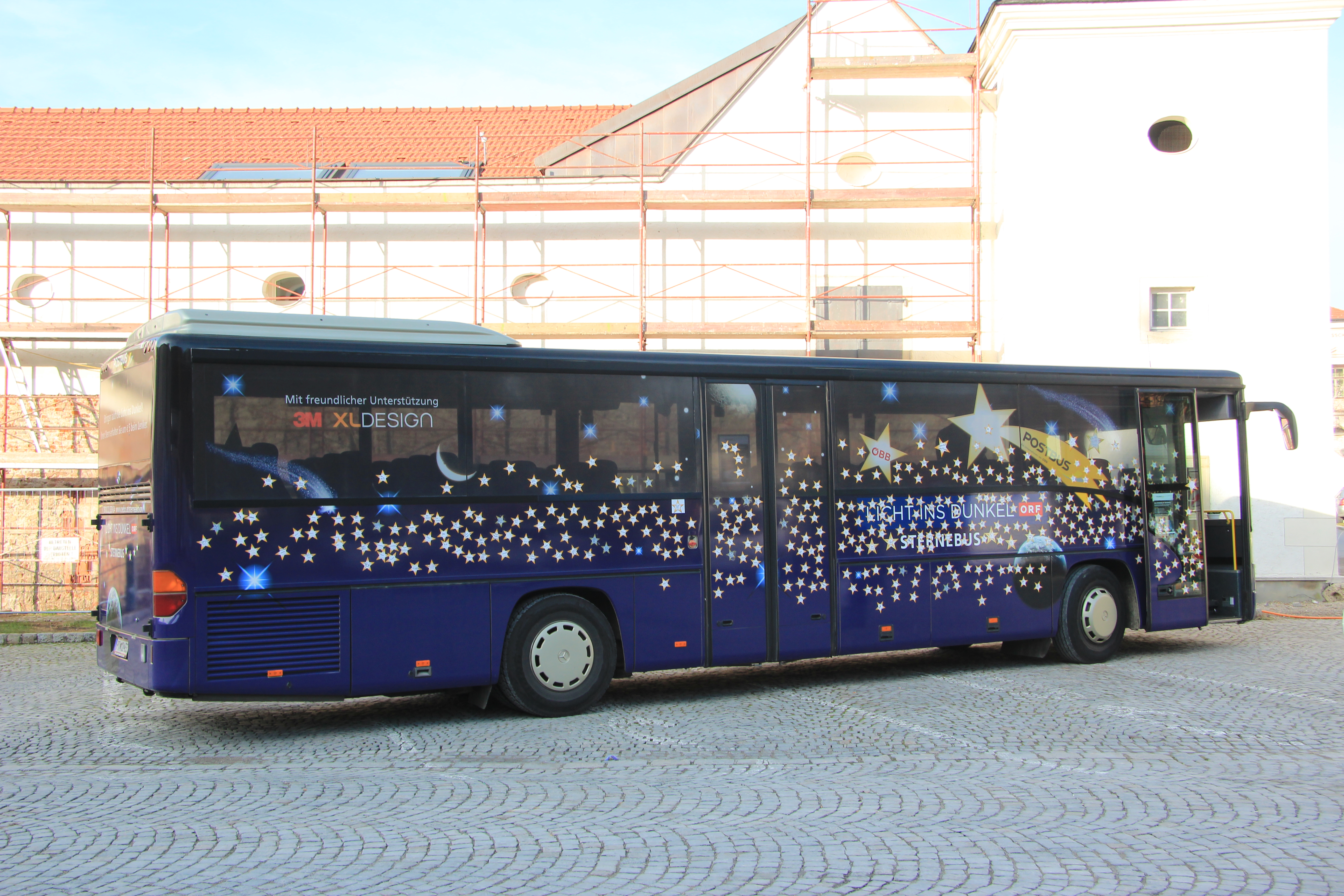 Sternebus der Aktion Licht ins Dunkel beim Adventmarkt im Stift Heiligenkreuz